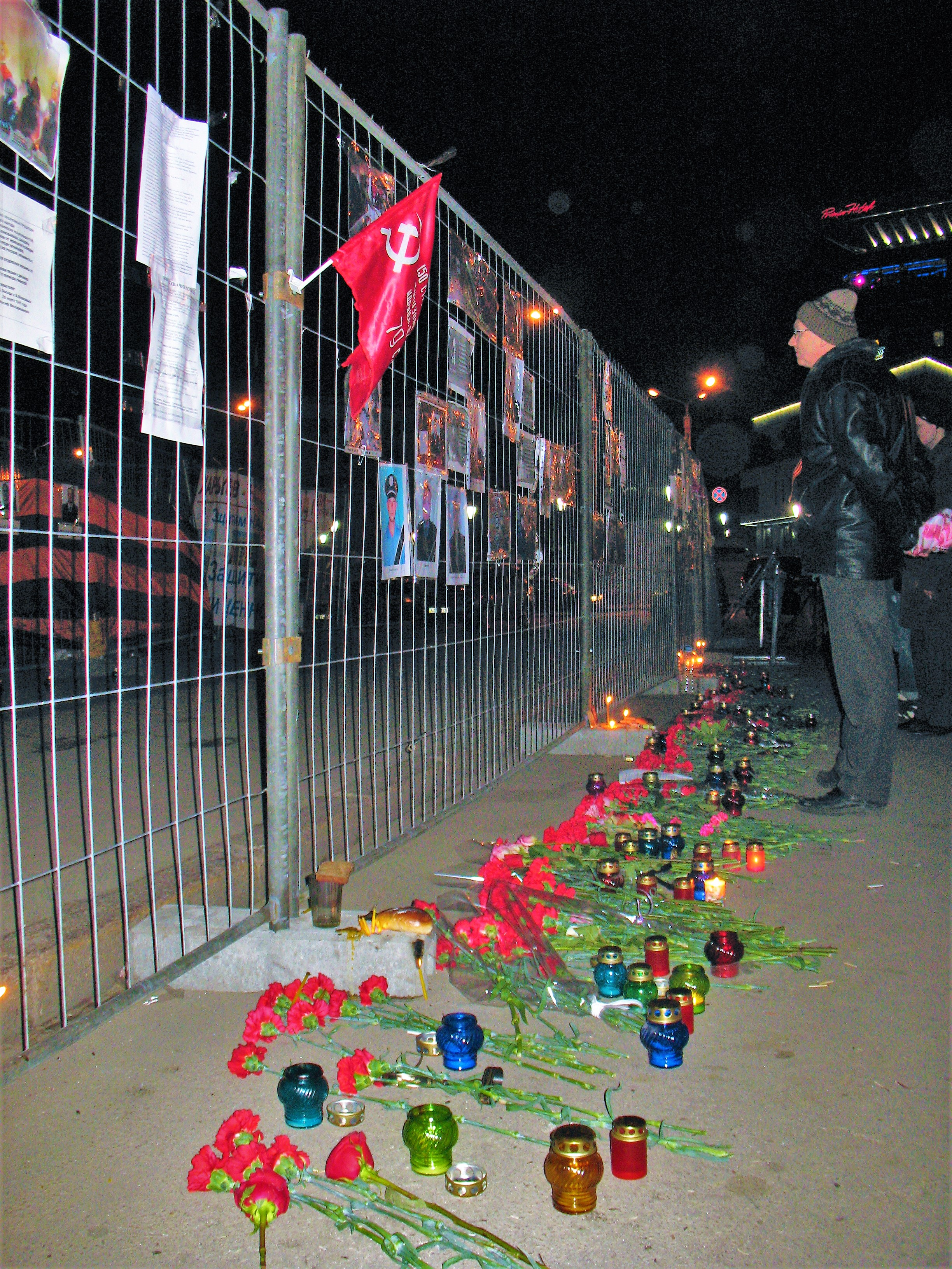 Харьков, 1 марта. Площадь Свободы. Памяти героев "Беркута" и милиции, убитых на майдане в Киеве. Православные лампады, поминовение. Над лампадами - Знамя Победы в Великой Отечественной войне.